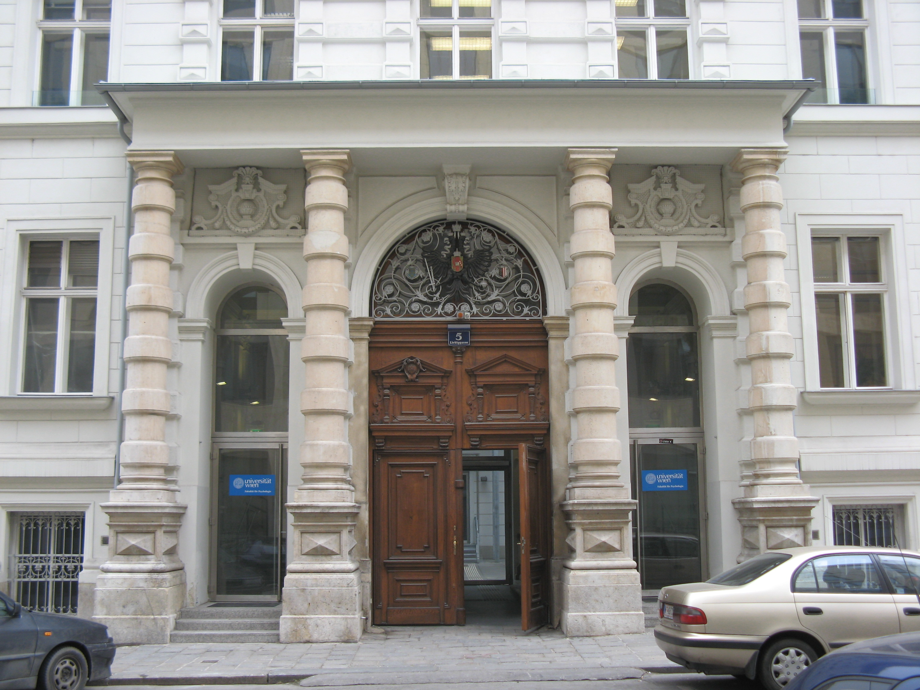 Ehemaliges Ackerbauministerium (1882-83) von Emanuel Trojan von Bylanow, Liebiggasse 5, Wien-Innere Stadt